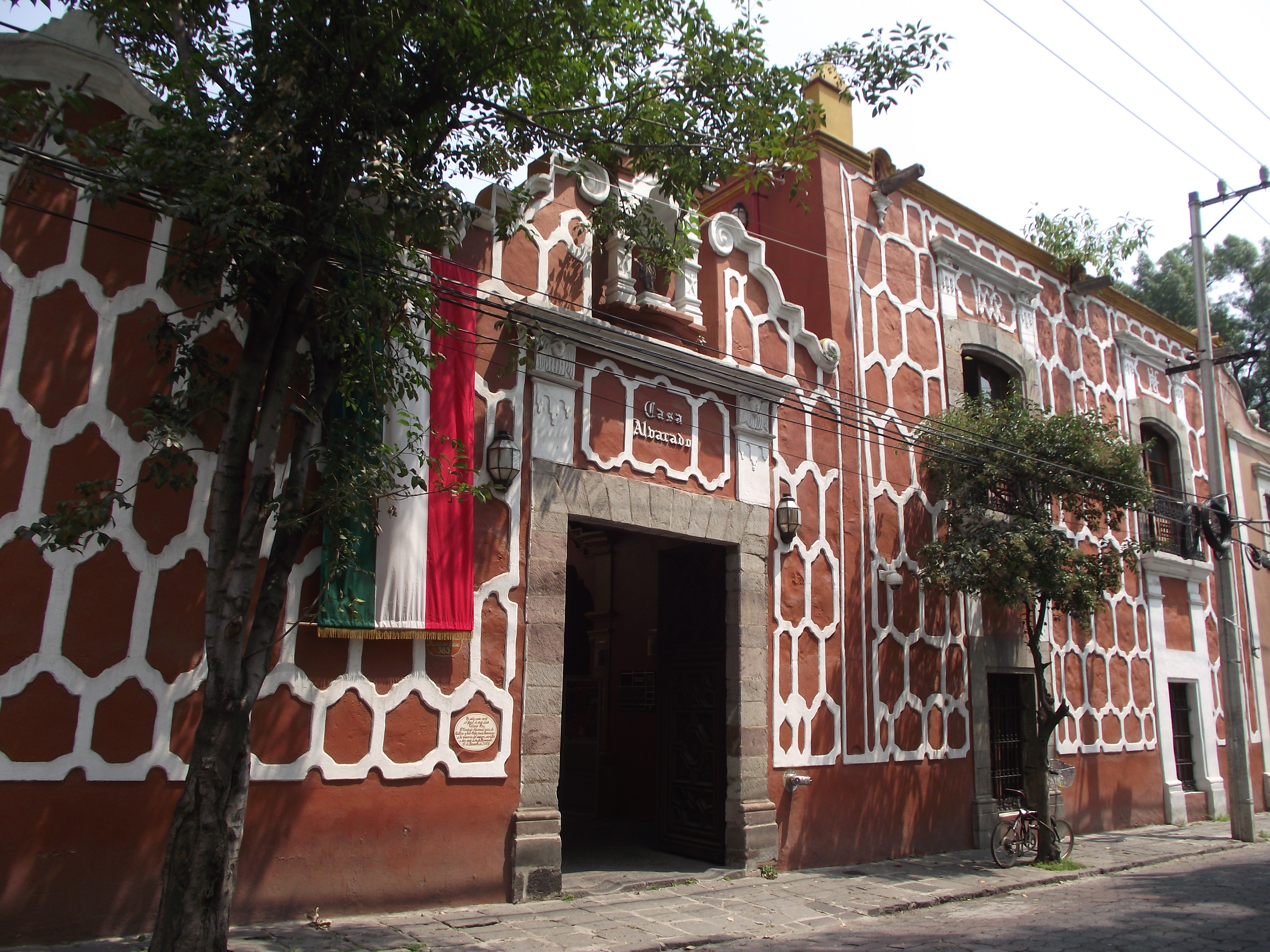 Casa de Alvarado.